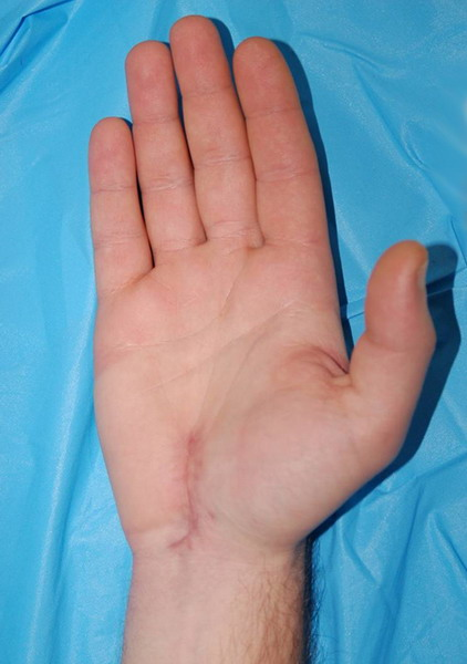 Վիրահատական սպիի տեսքը դաստակային թունելի բացազատումից 3 ամիս անց: Ավելի ուշ շրջանում սպին դառնում է գրեթե աննշմարելի